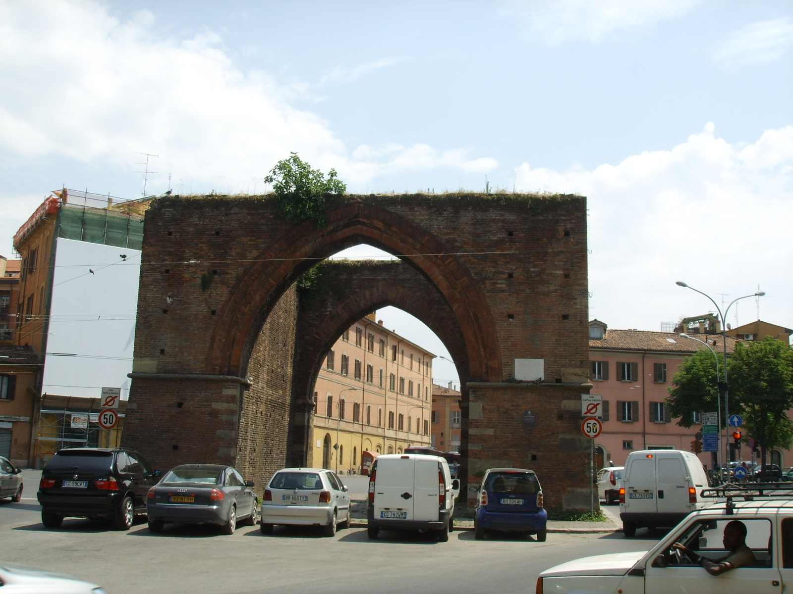 Porta Maggiore, Bologna